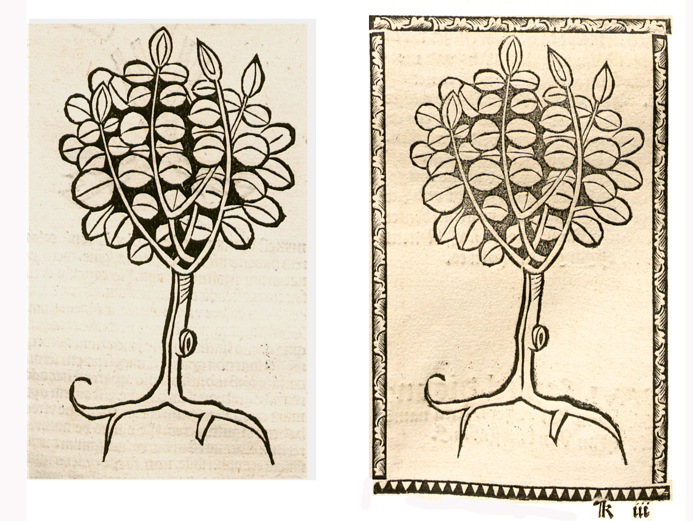 Abbildung von: Esche